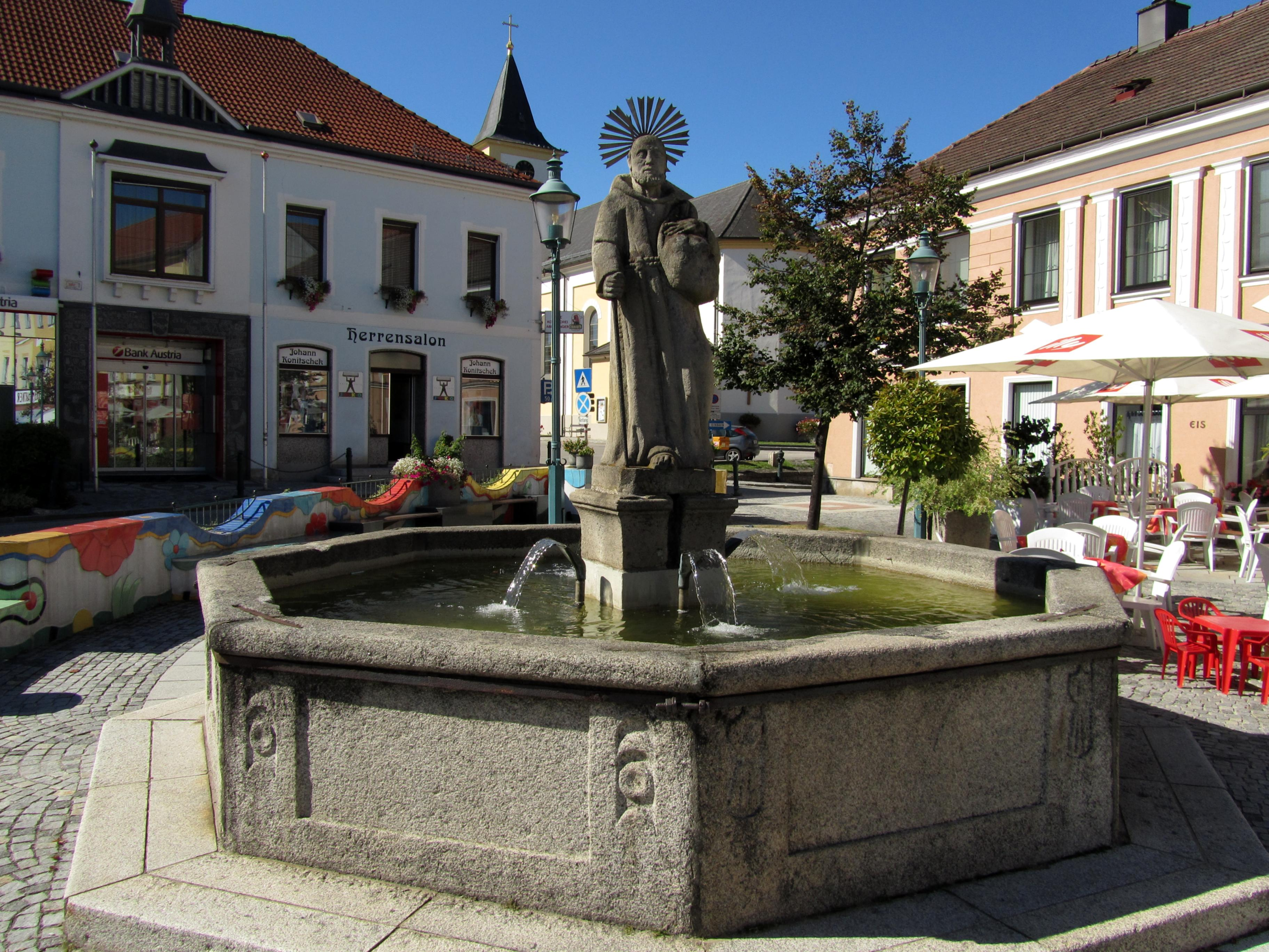 Brunnen mit Figur hl. Felix von Cantalice